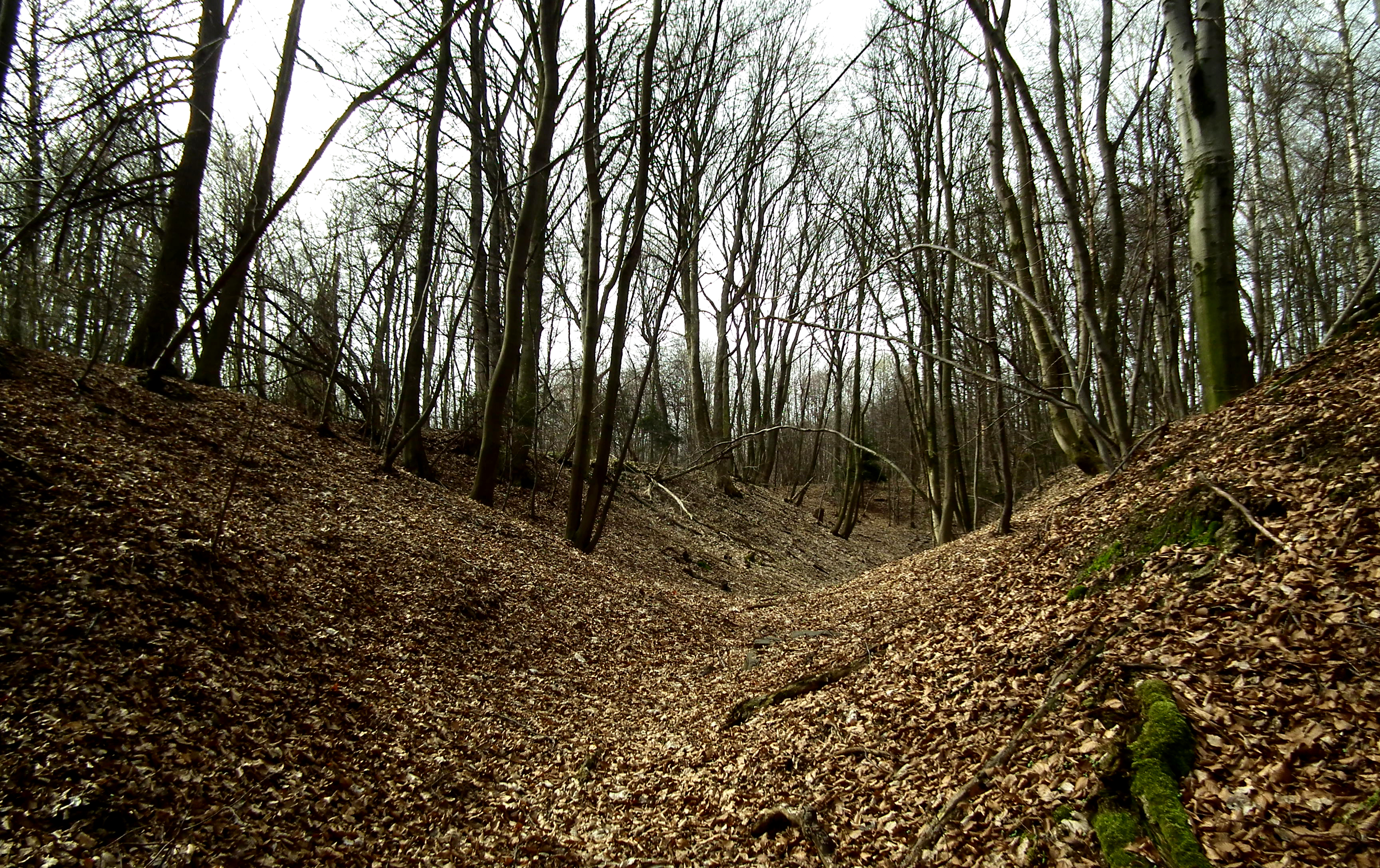 Widok wzdłuż osi jednej z form linijnych Diabelskiej Kręgielni.